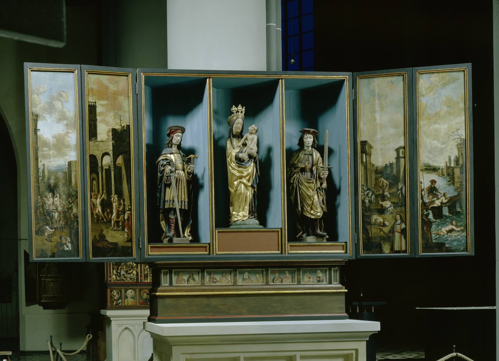 Église de Kalkar - Autel de Crépin et Crépinien